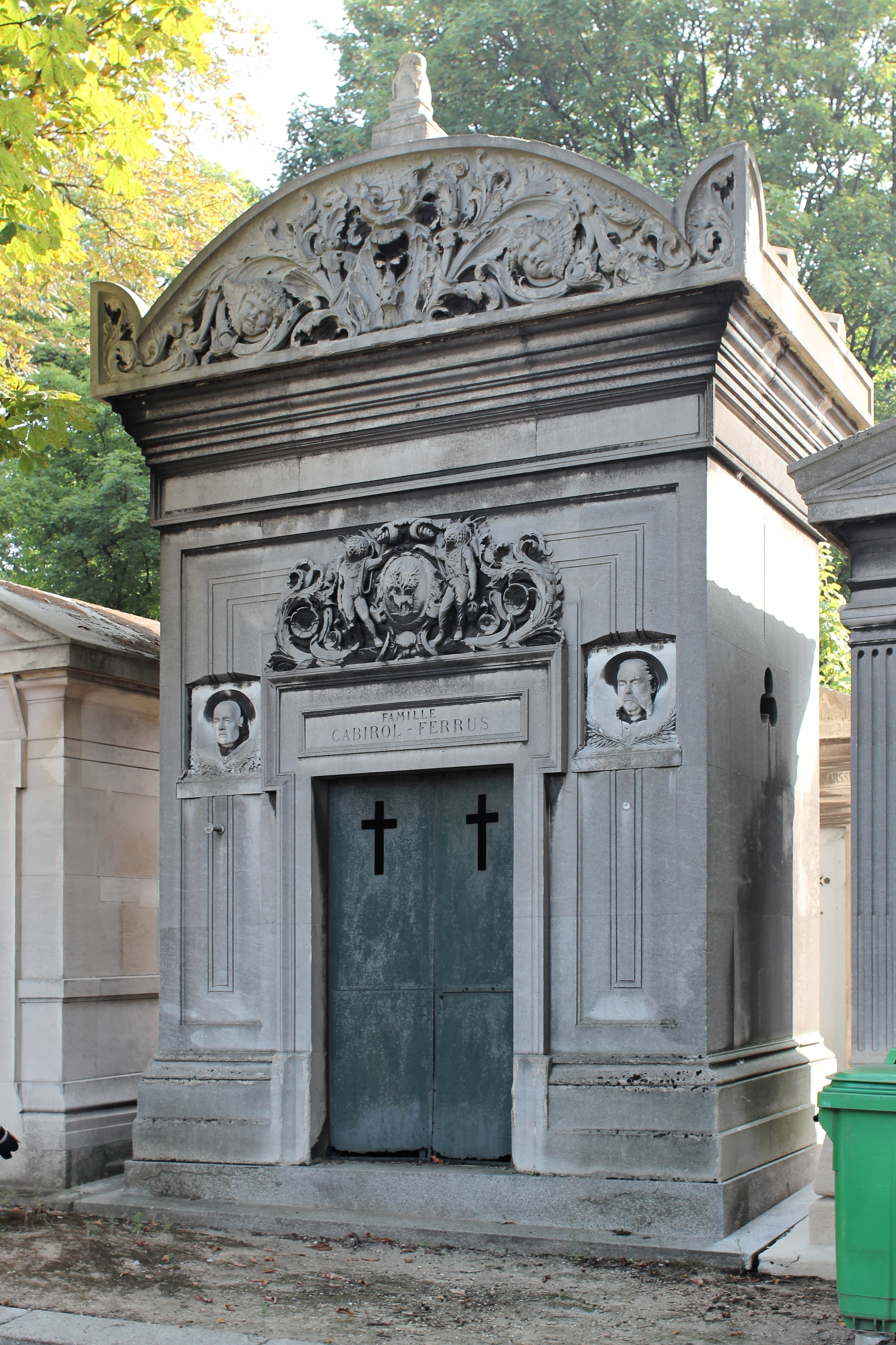 Chapelle avec bustes en reliefs de part et d'autre de la porte et reliefs de scaphandriers en dessus-de-porte. Fronton circulaire à rinceaux peuplés de chérubins.